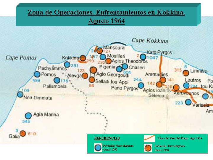 Composición étnica de las localidades próximas a Kokkina - 1960. Sobre del folleto "From 1960 to present day. The Cyprus Republic" - 1998 y del libro "The Road to Bellapais" de Pierre Oberling, NY, 1982.